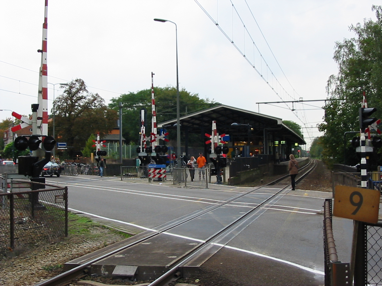 Zelfgemaakte foto. Station Bilthoven (2006-10-26). Bilthoven